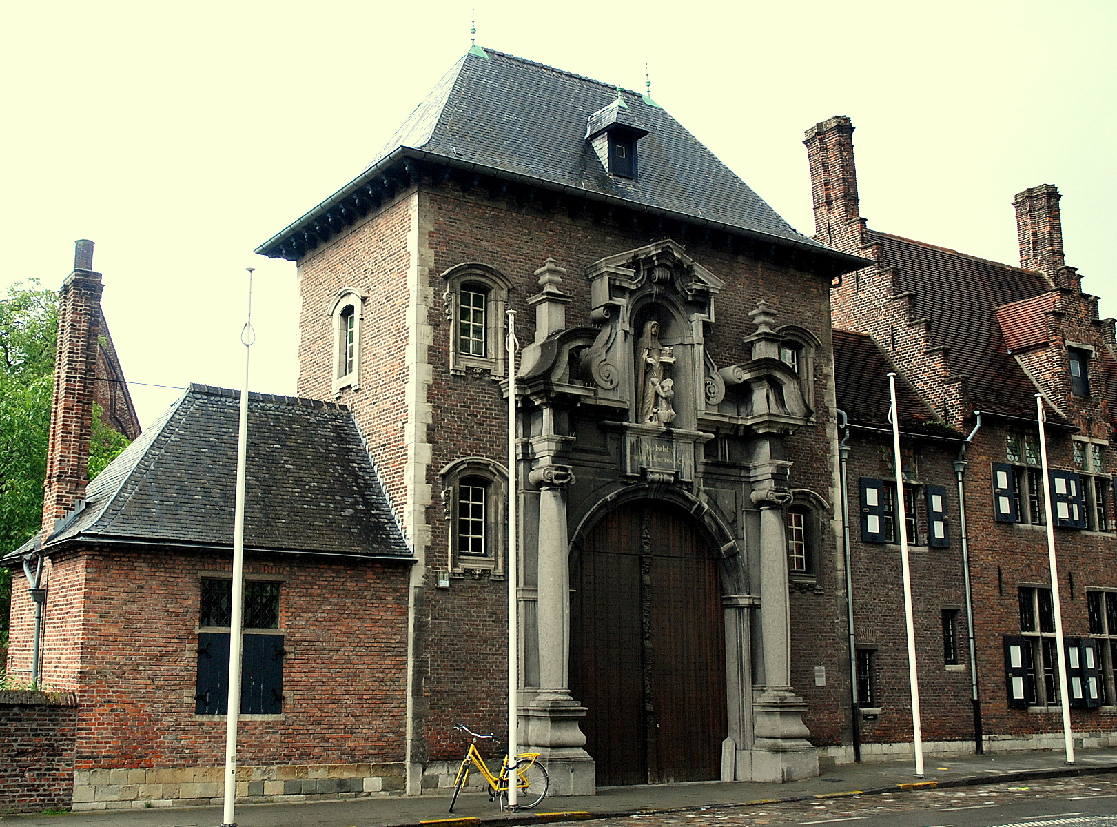 Het poortgebouw van het oude Sint-Elisabethbegijnhof - heropgebouwd als deel van de Bijloke-site aan de Godshuizenlaan